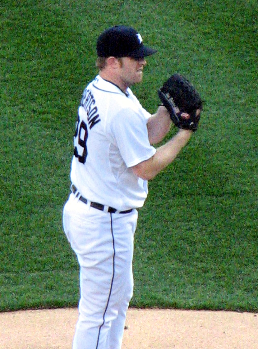 Nate Robertson